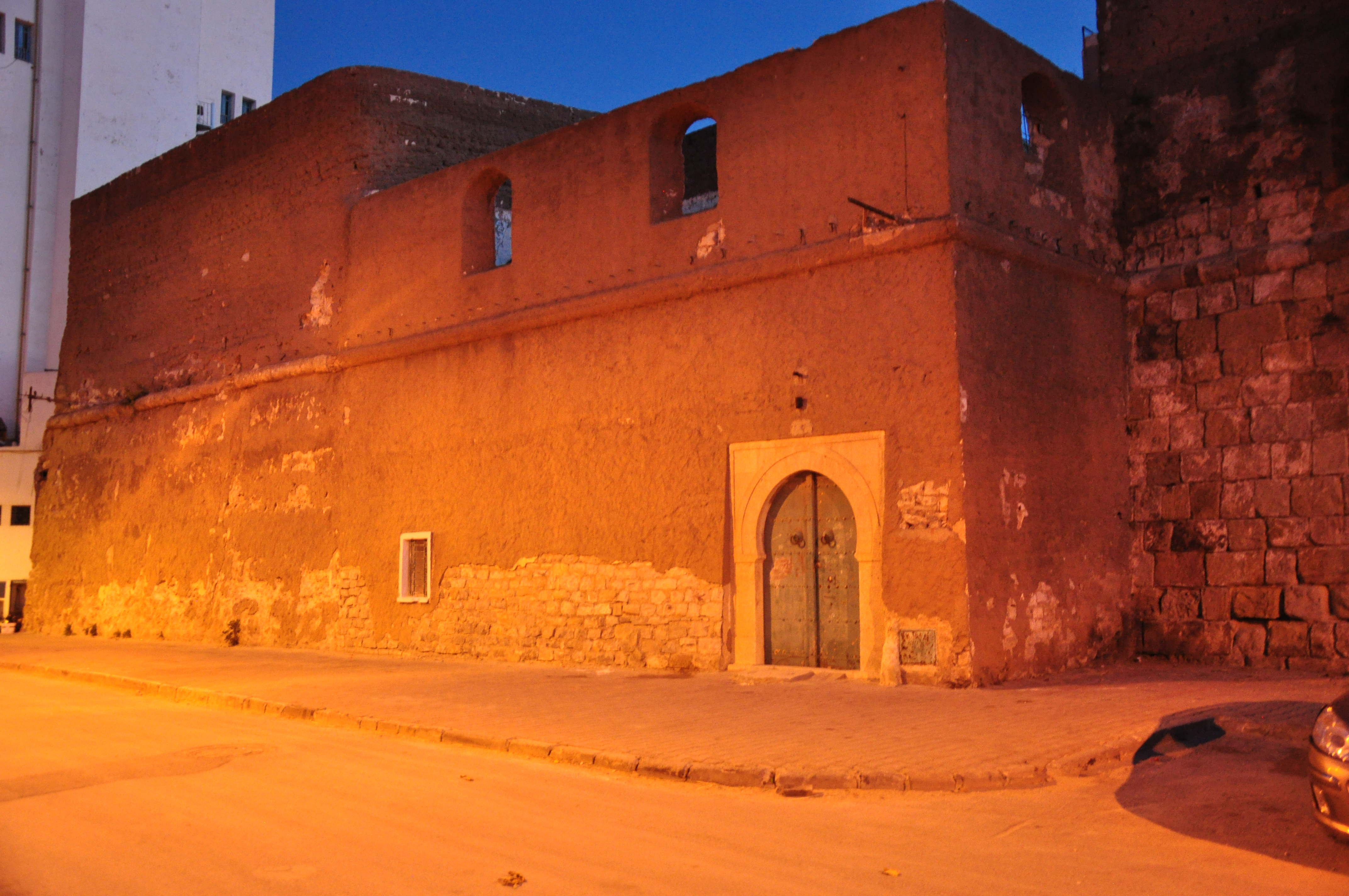 Ancien bagne dit Karaka